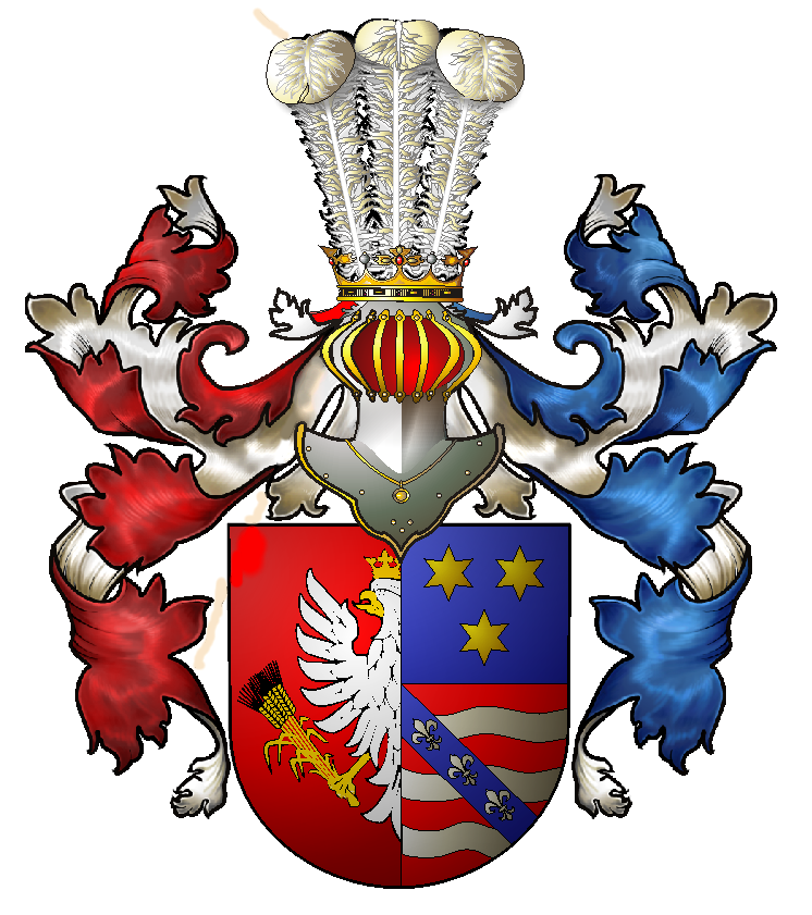 Herb Andrault de Buy, wg. J. Ostrowskiego "Księga herbowa..."